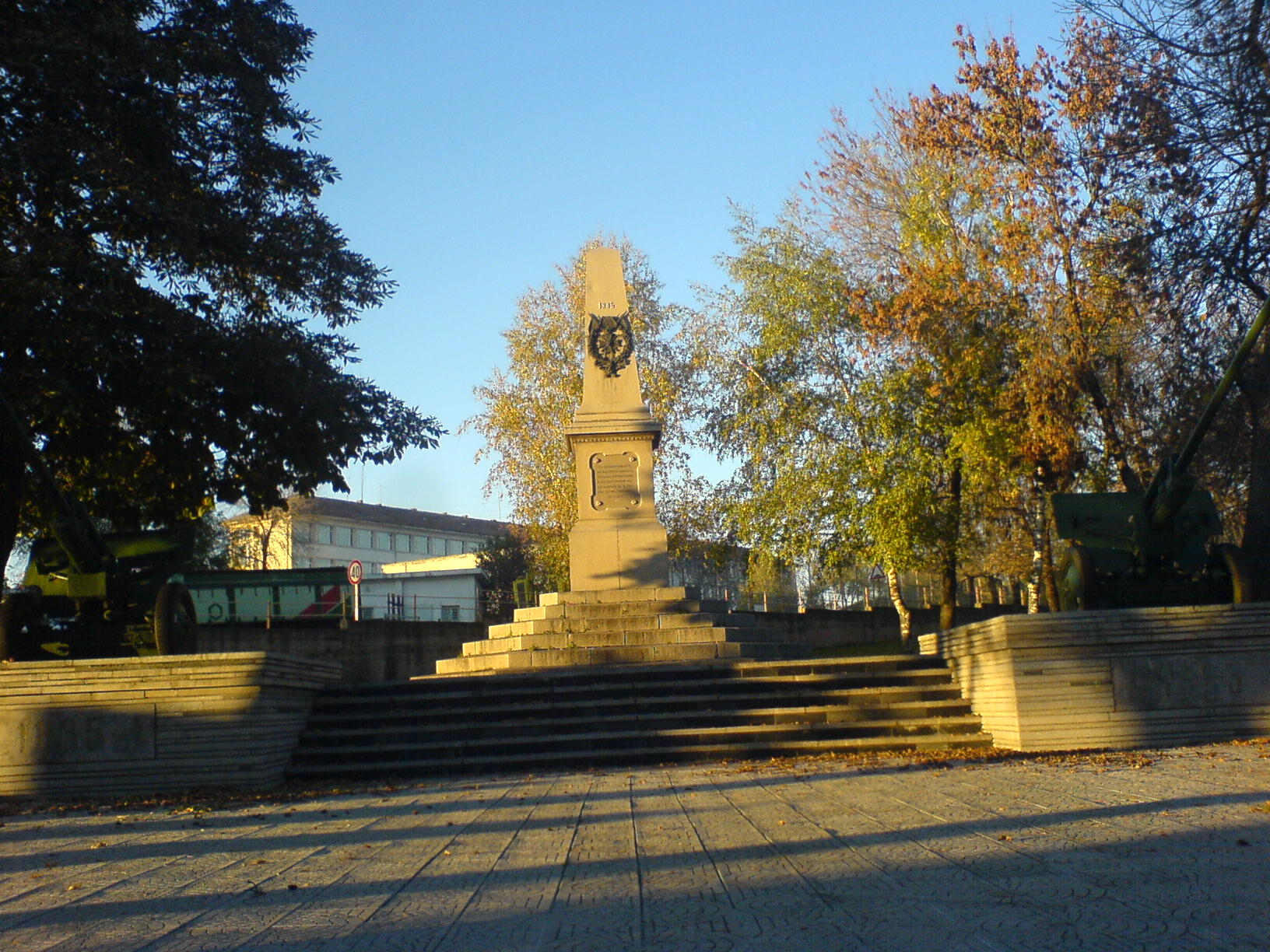 Memorial “Serbo-bulgarian war” 1885, Breznik, Bulgaria